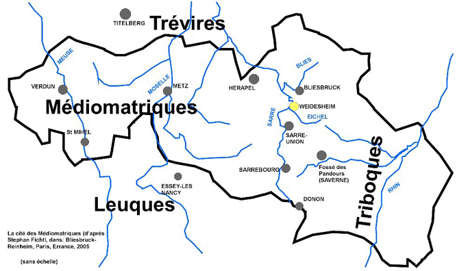 Territoire des mediomatrices